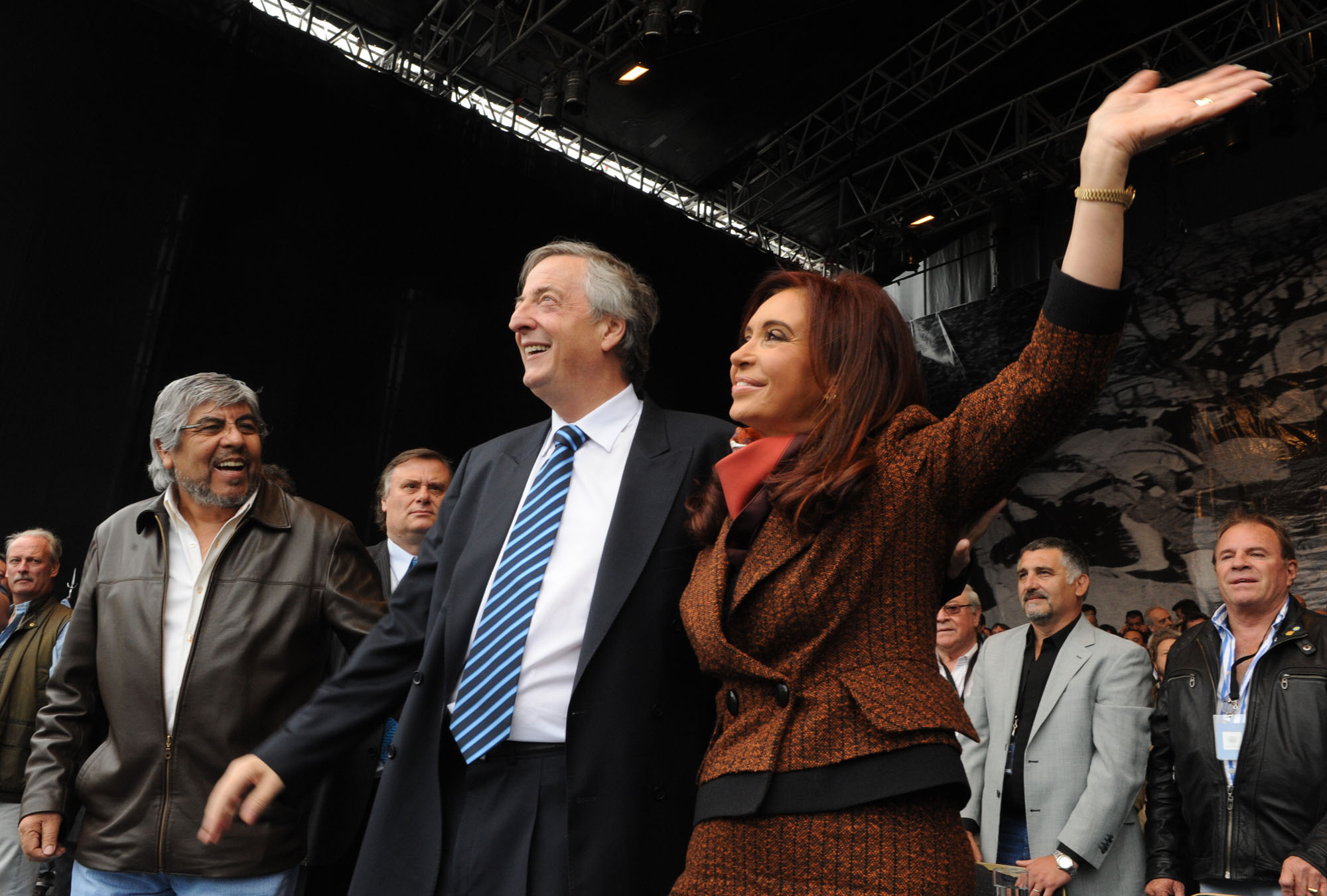 Cristina Fernández durante el acto por el Día de la Lealtad Peronista junto a su marido Néstor Kirchner